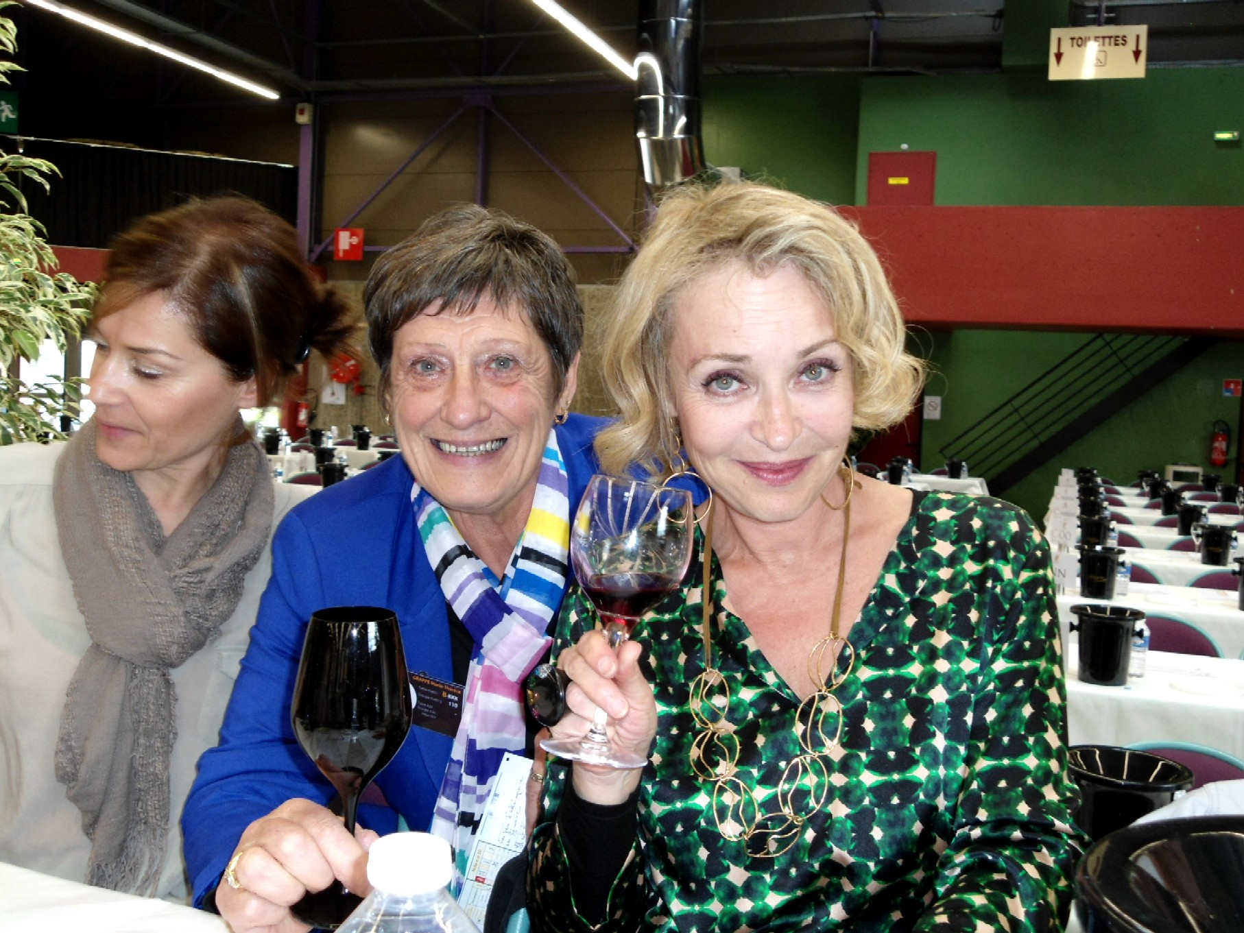 Fanny Cottençon ( actrice et présidente du concours ) et Marie Thérèse Grappe ( Jury, présidente de l'Association des œnophiles et dégustateurs du Jura ) , 7e concours des Féminalise 2013, palais des congrès de Beaune en Bourgogne